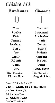 Detalle del partido 113 entre Gimnasia y su clásico rival.